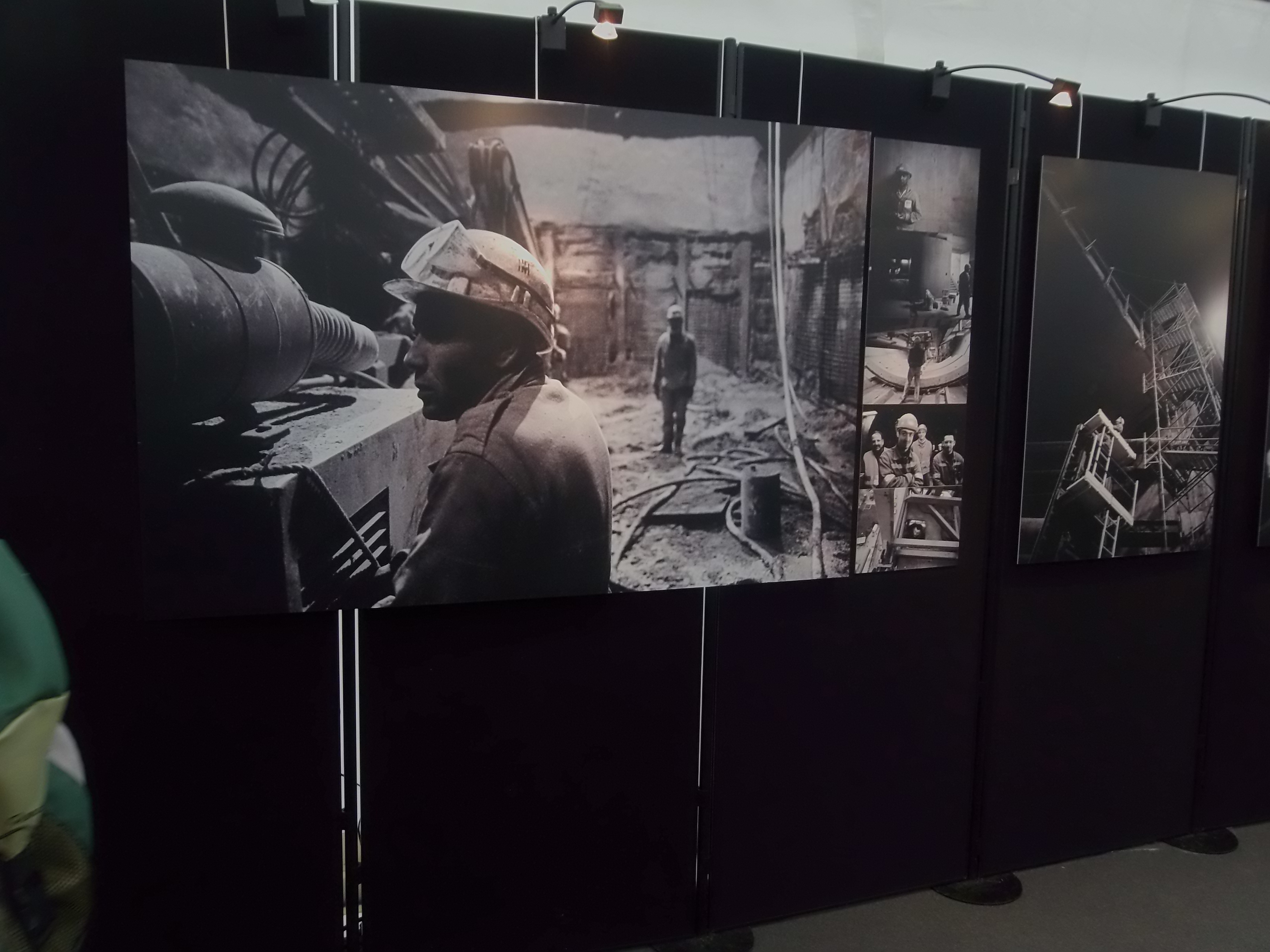 Visite du chantier du tunnelier de la ligne B du métro de Rennes le 22 décembre 2014. Photos des travaux de la ligne A.